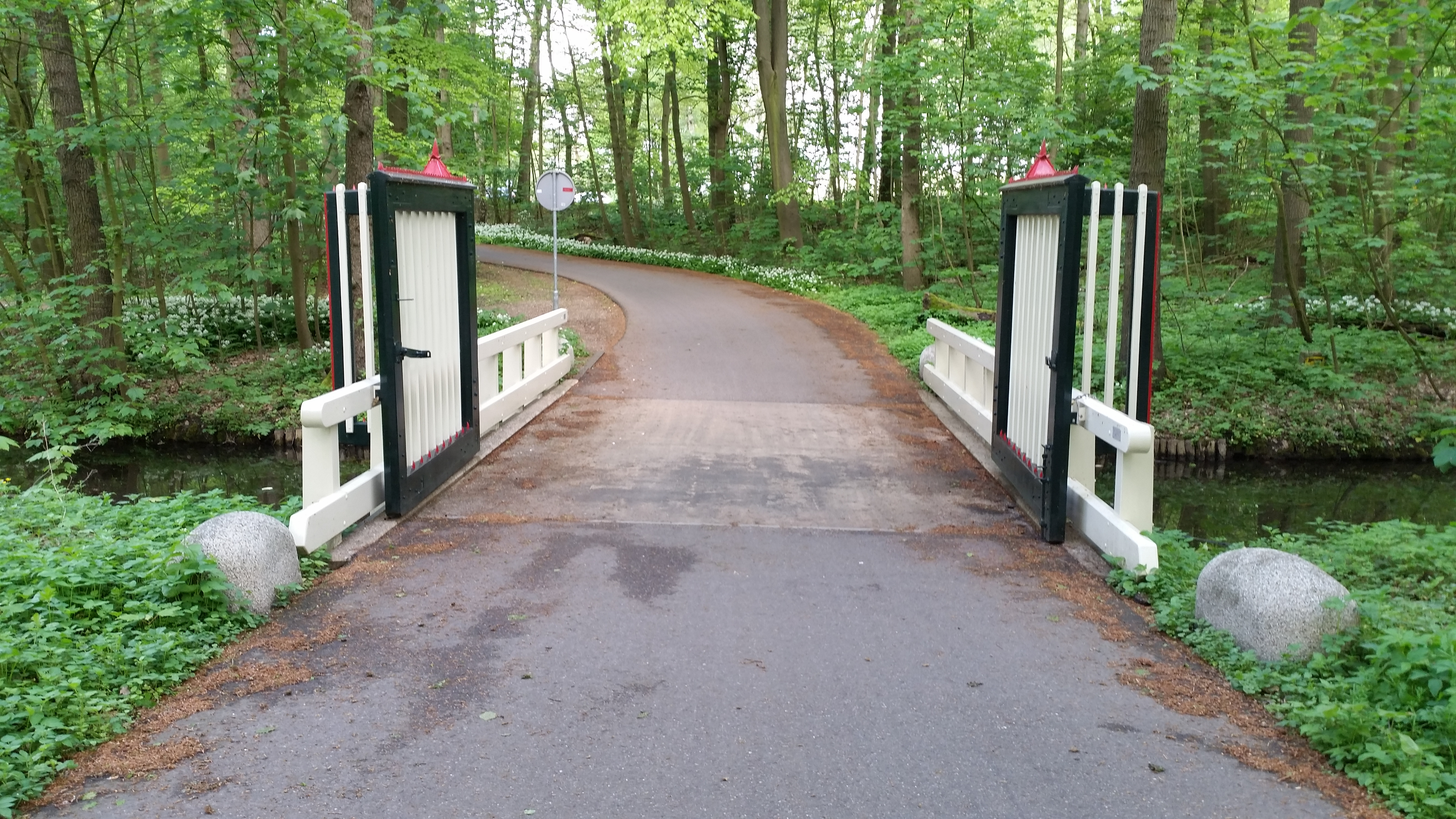 Overzicht van Brug 514 (in Amsterdam)